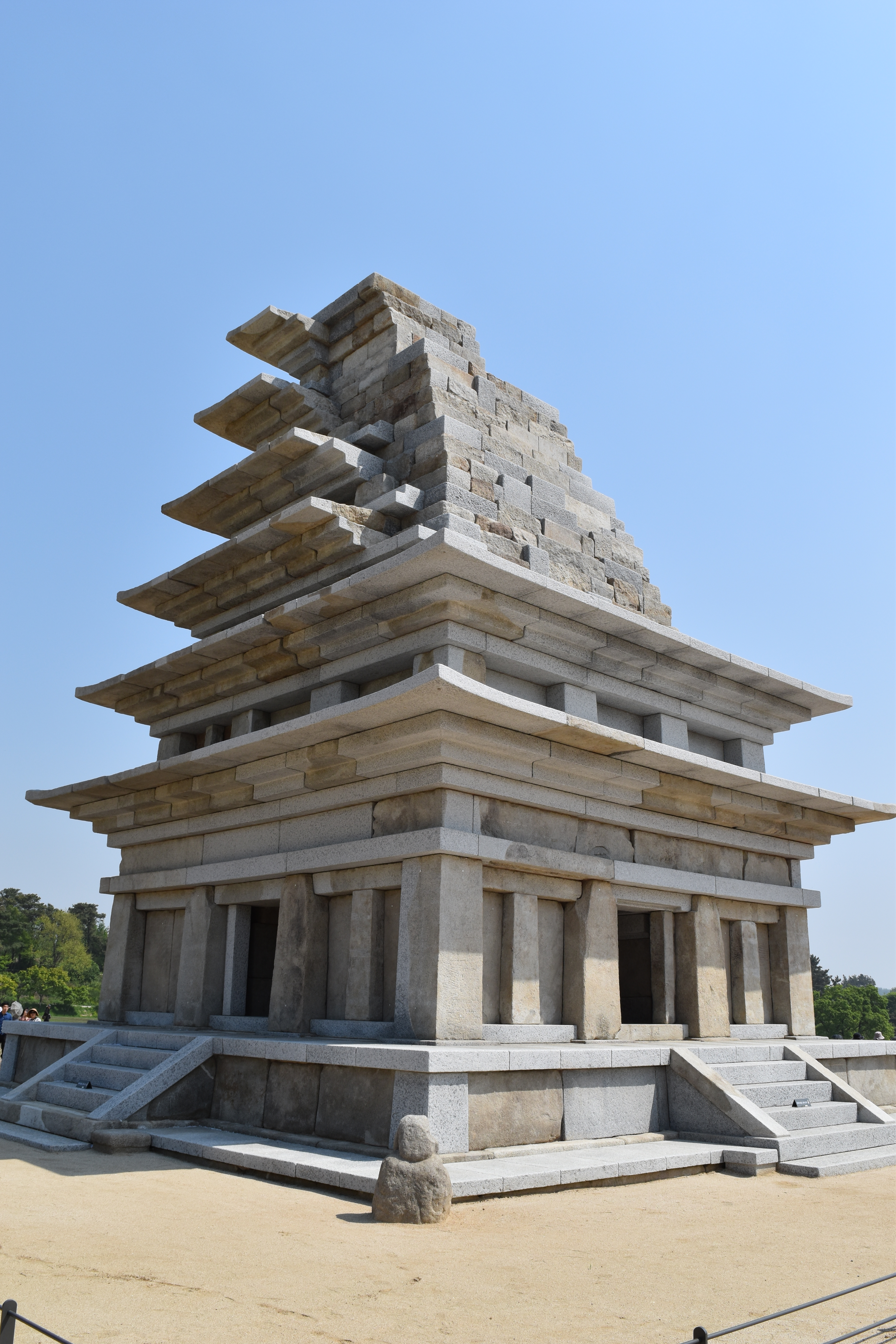 미륵사지 석탑